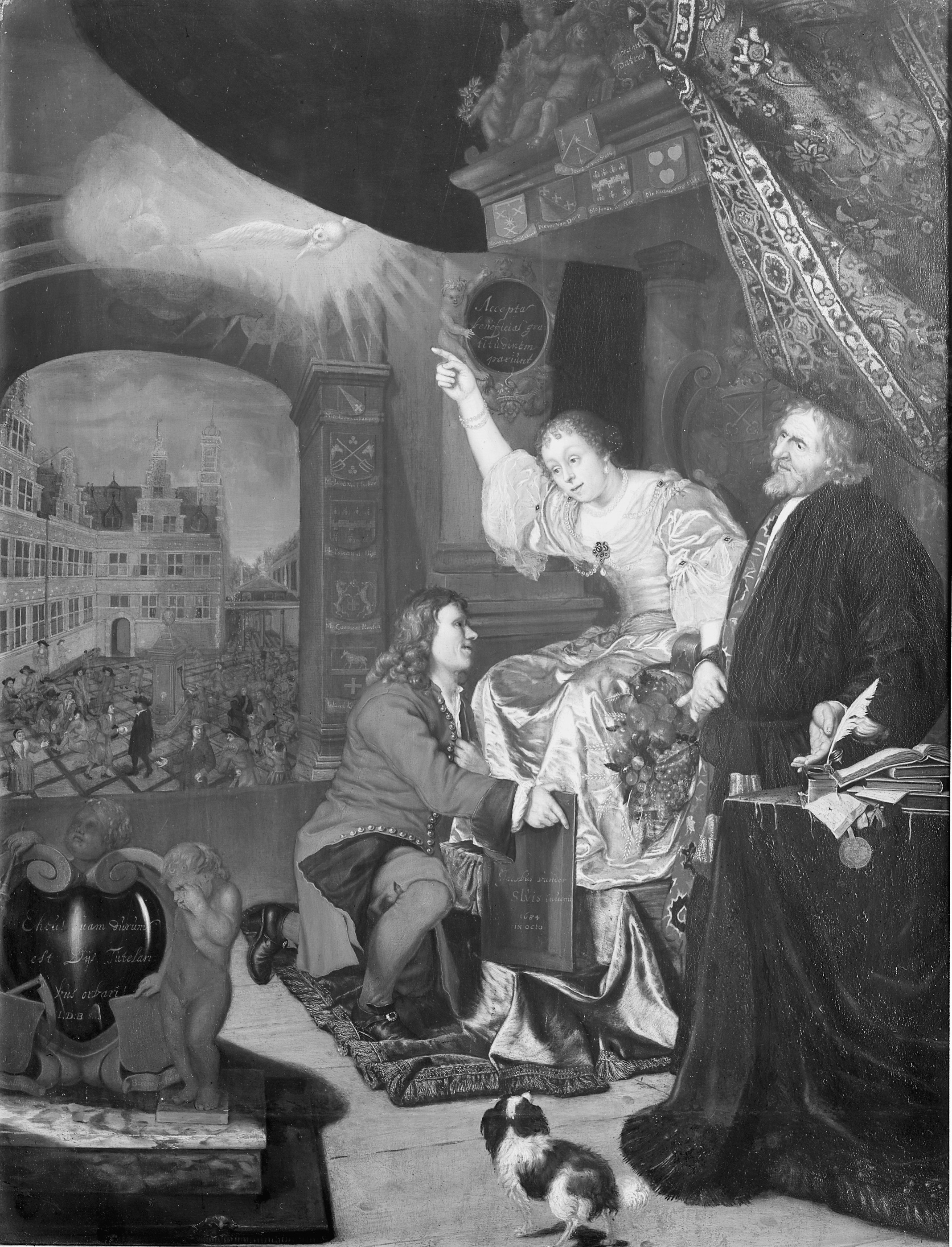 Weeshuis: Allegorie‰n door J.v.d.Sluys